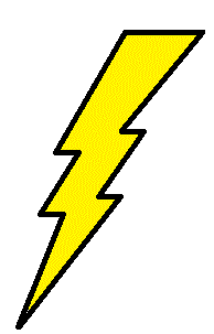 Harry's lyn. Lavet i Paint